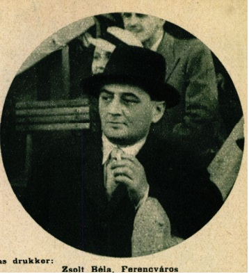 Zsolt Béla újságíró, (Komárom, 1895. jan. 8. – Bp., 1949. febr. 6.) a Ferencváros-Hungária meccsen